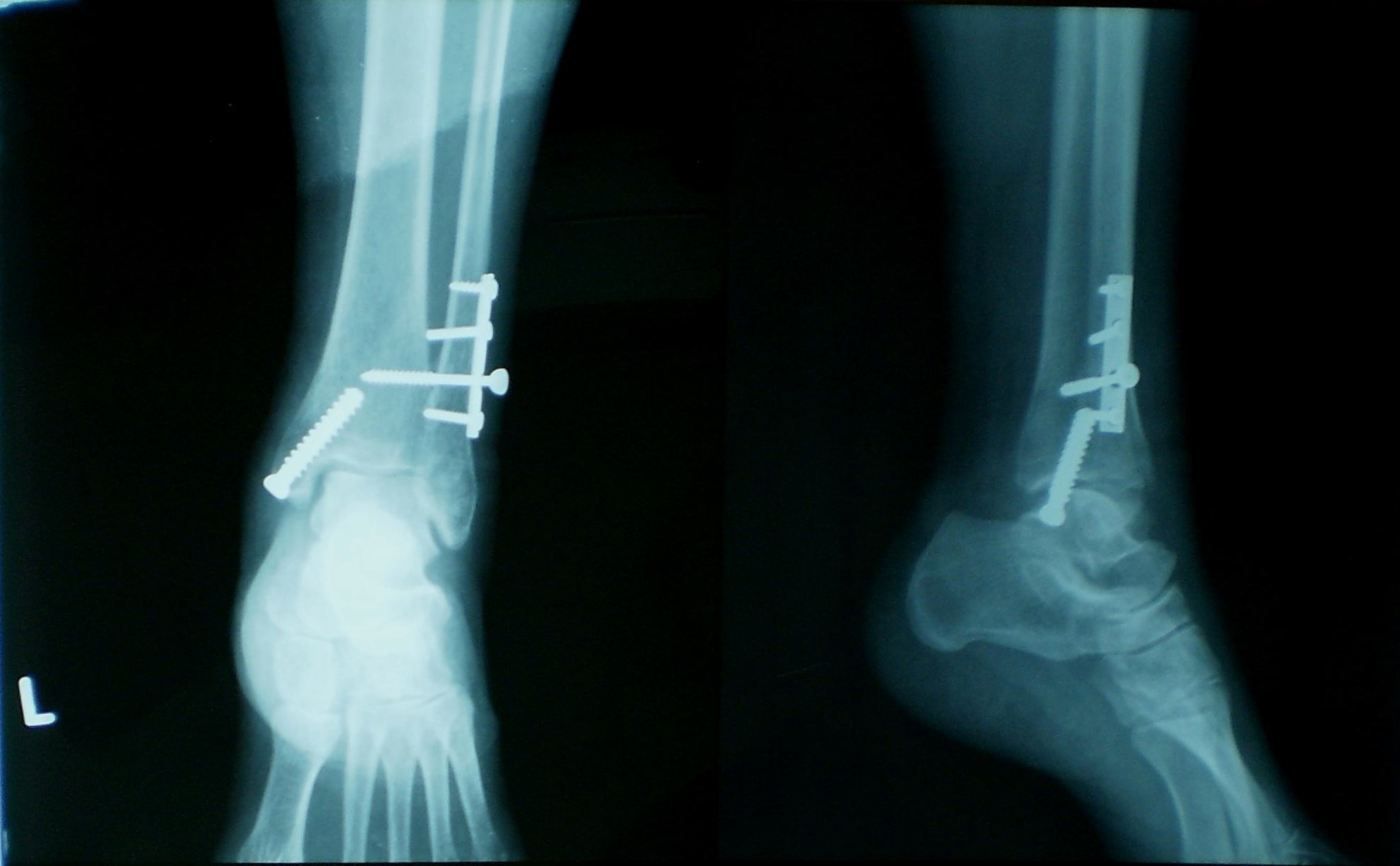 Fractura bimalleolaris sin. Autor: Milorad Dimic MDSrpski (latinica): Obostrani prelom maleolusa leve noge